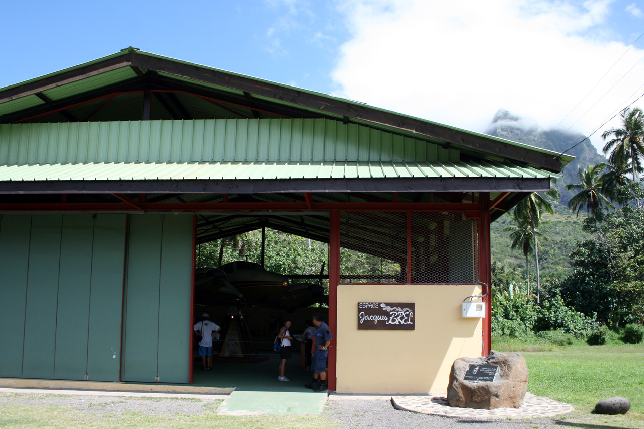 L'espace Jacques Brel à Atuona